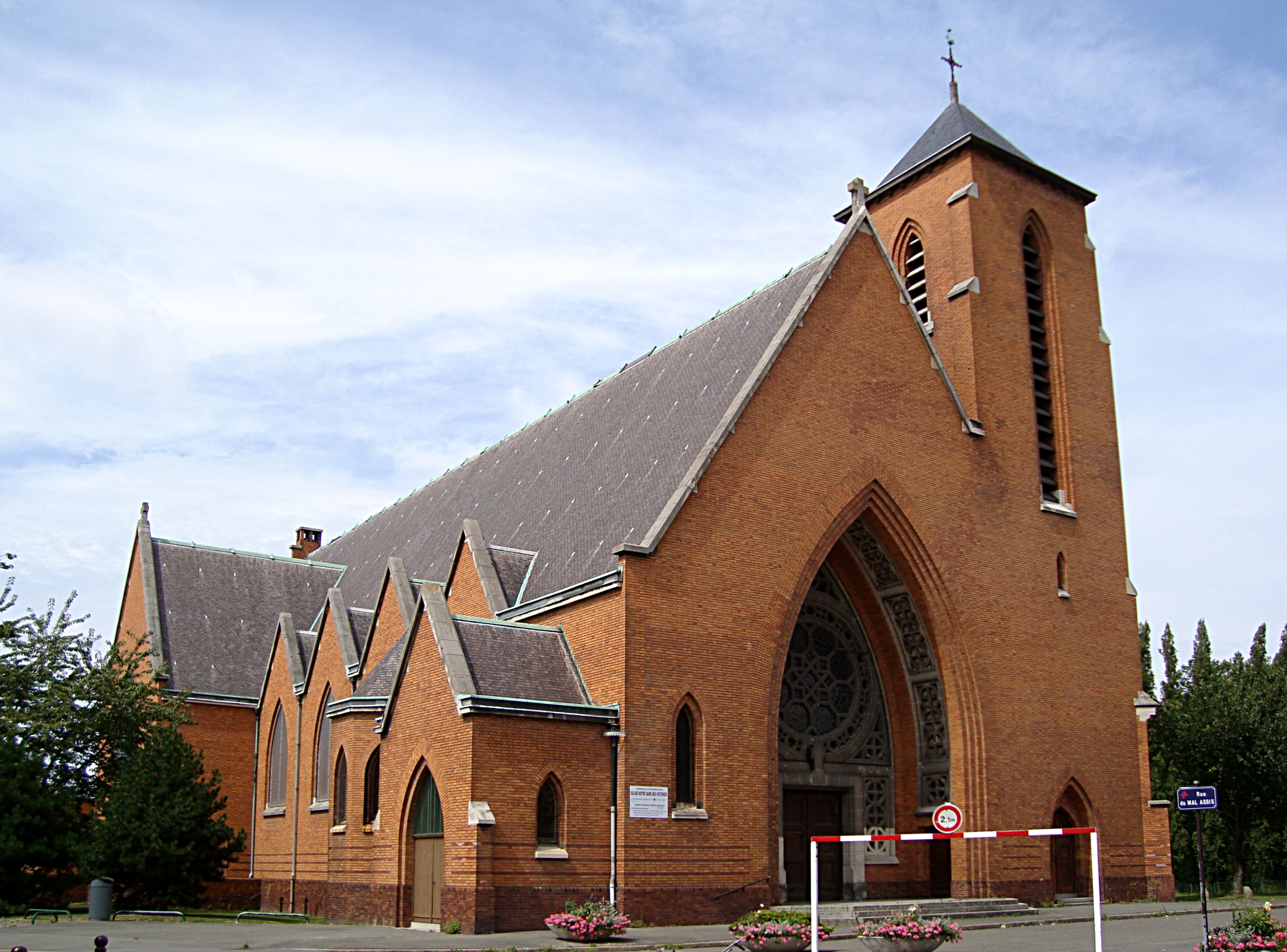 L'église Notre-Dame des Victoires dans le quartier du Faubourg de Béthune à Lille (Nord).